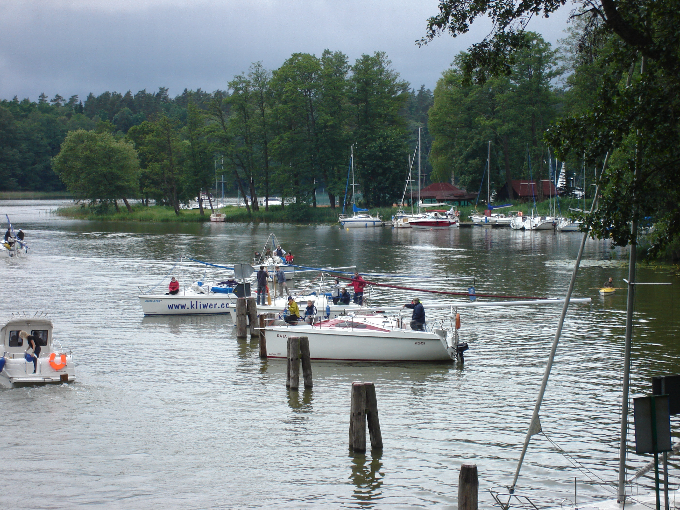 Śluza w Guziance, jachty czekają na możliwość wpłynięcia do śluzy.